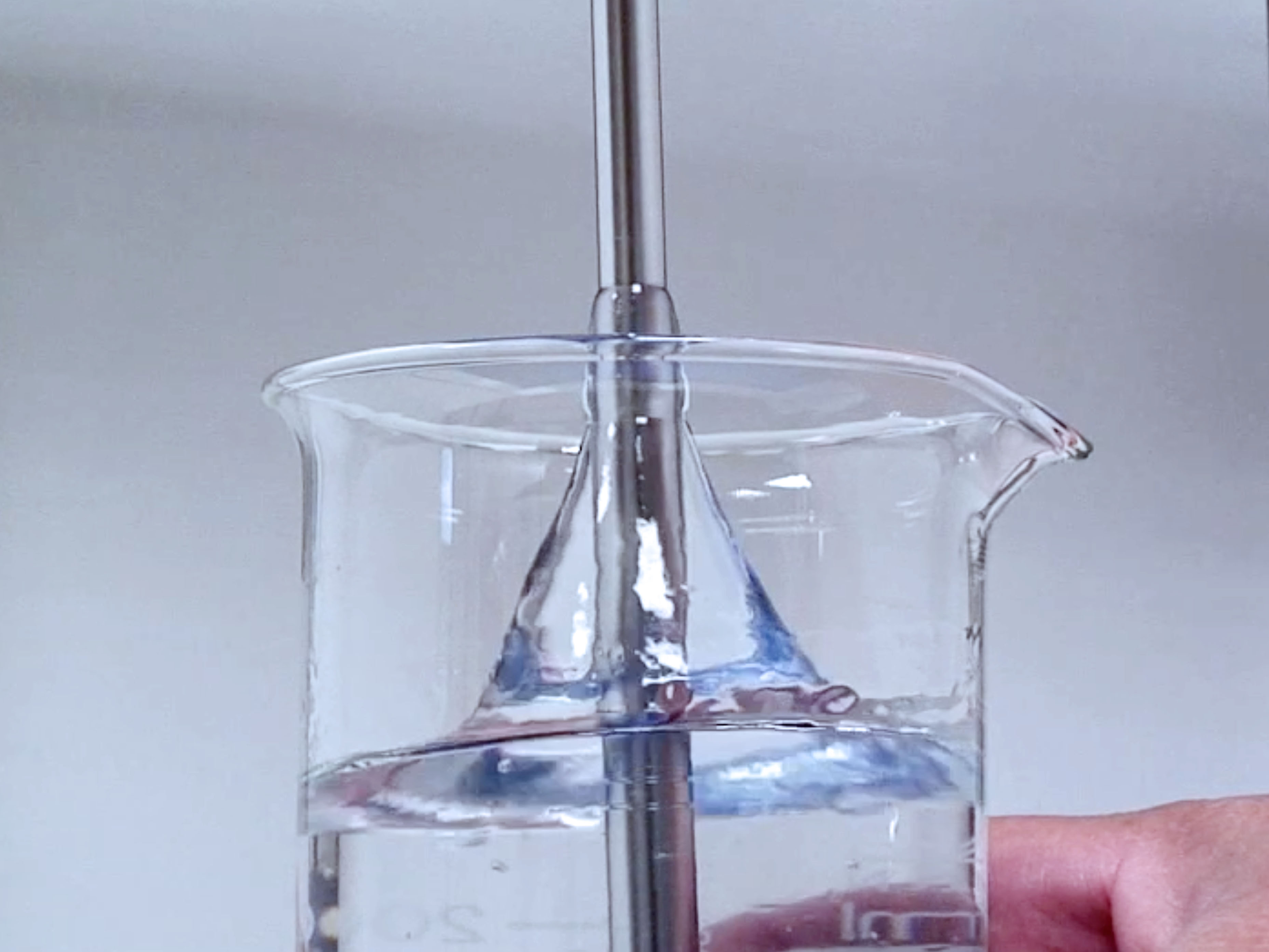 Illustration de l'effet Weissenberg sur une solution à 2% de polyacrylamide de haut poids moléculaire